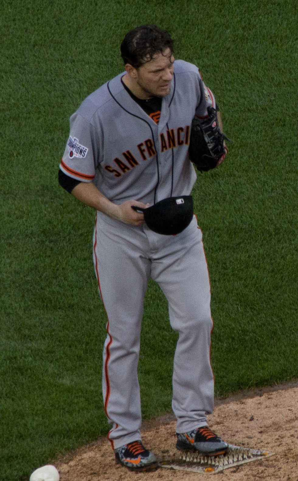 Jake Peavy